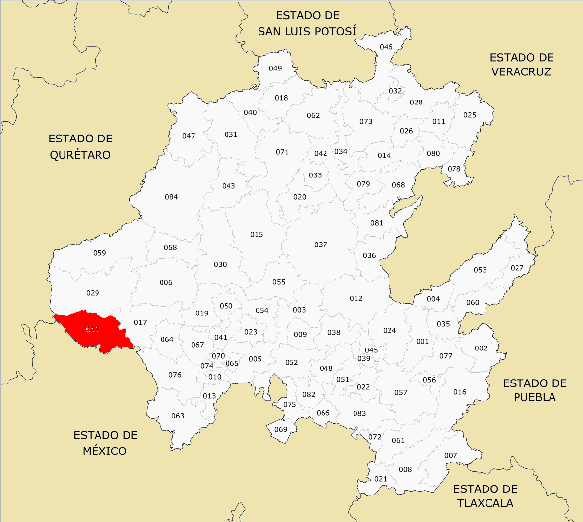 Municipio de Hidalgo